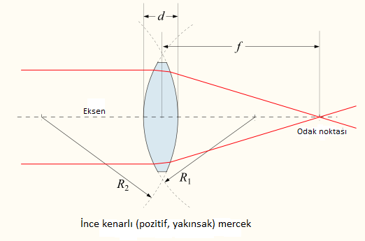 İnce kenarlı (pozitif, yakınsak) mercek